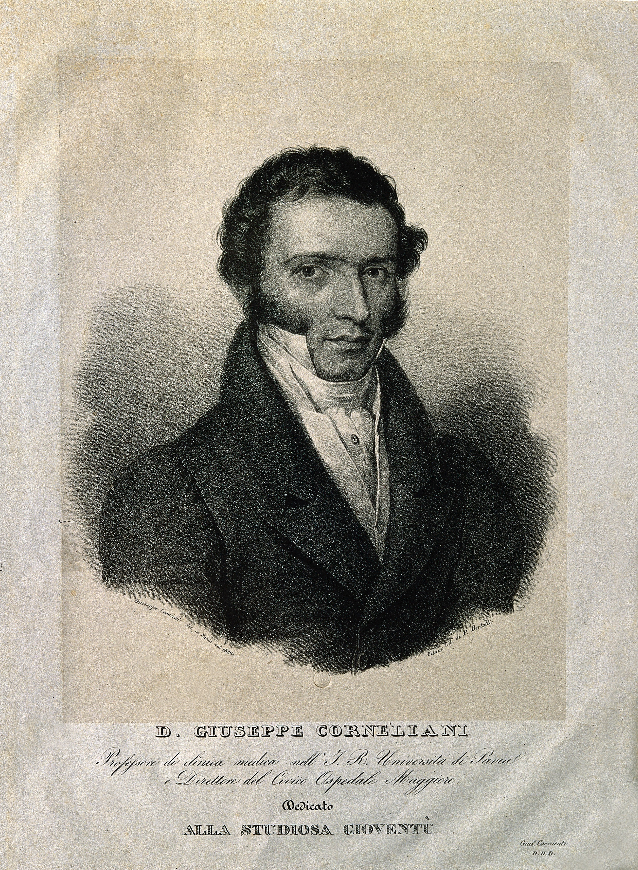 Genre/Technique: Portrait prints. Lithographs. Subject name: Corneliani, Giuseppe, 1797-1855.